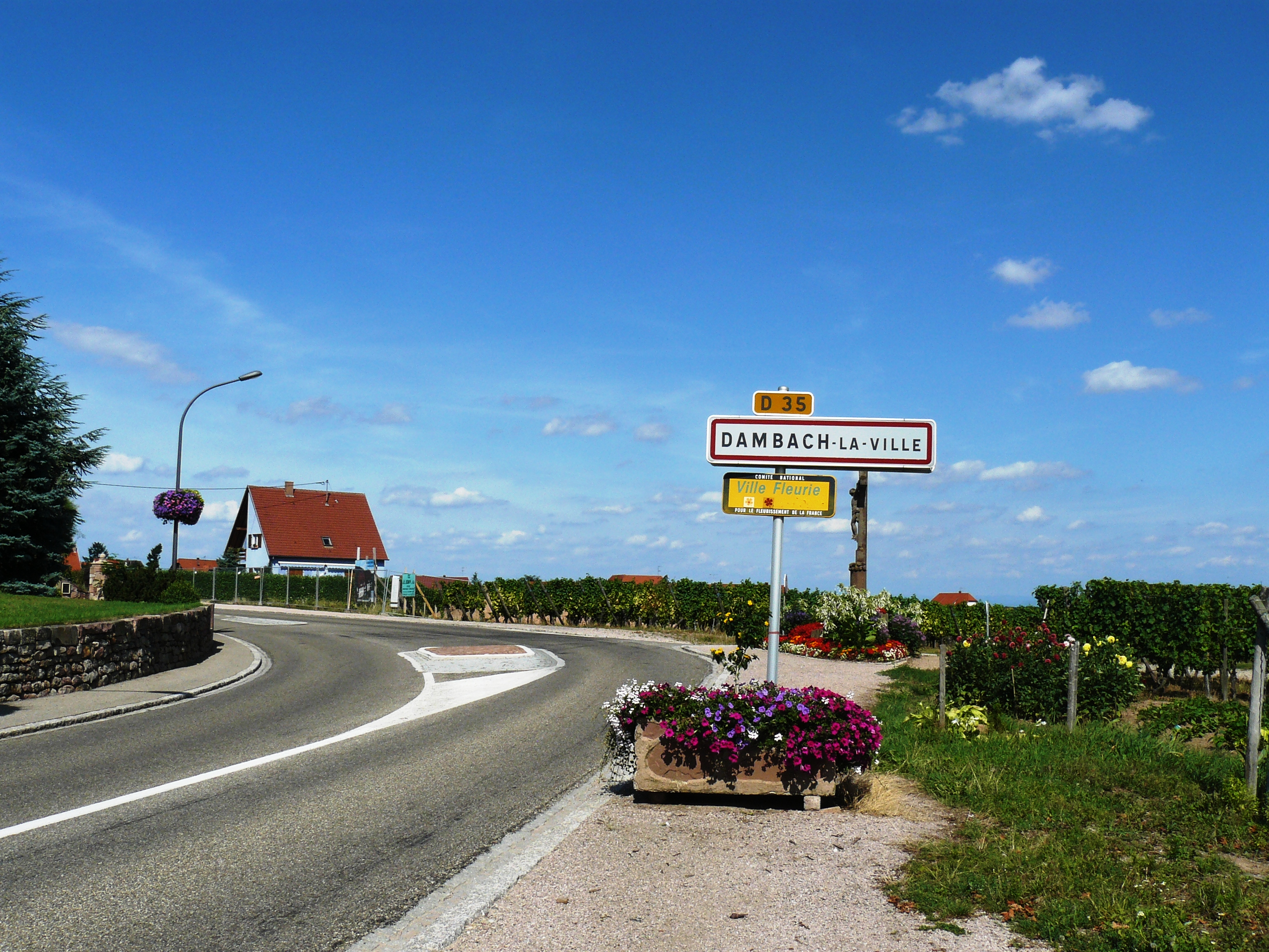 Entrée du village de Dambach-la-Ville en venant de Dieffenthal